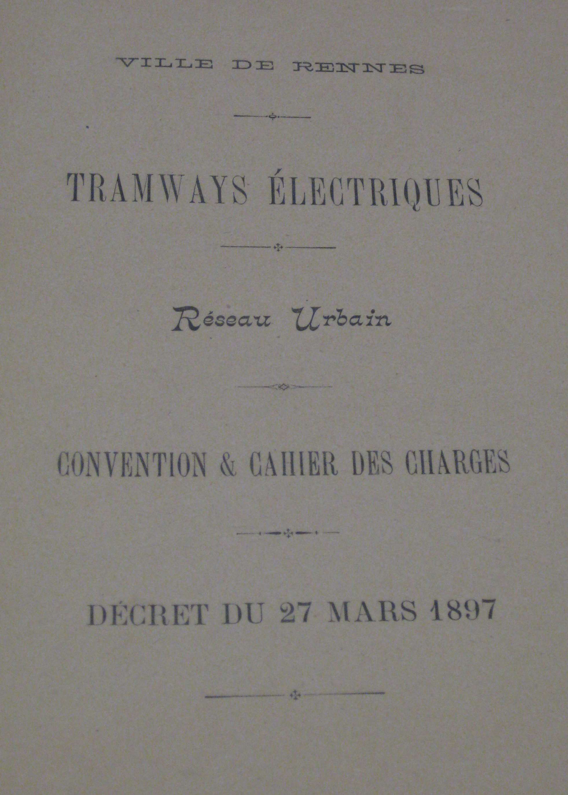 Convention et Cahier des Charges relatif à la concession d'un réseau de tramway à Rennes